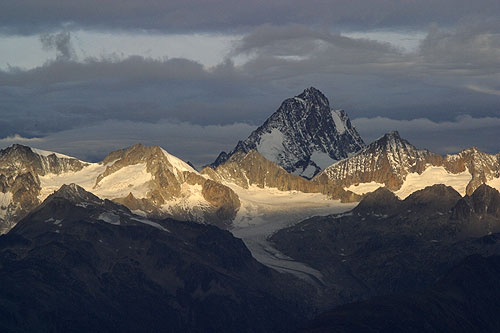 Finsteraarhorn vom Nufenenpass her gesehen